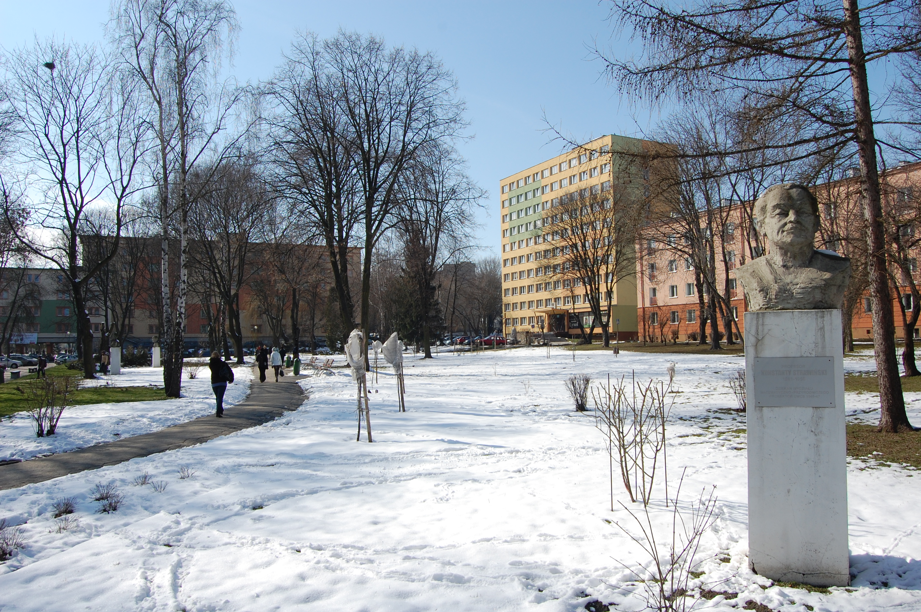 UMCS w Lublinie, park i akademiki